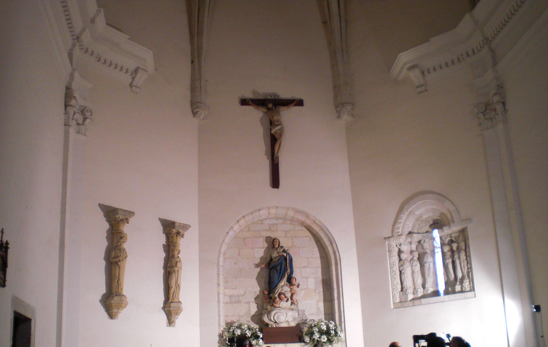 Gasteizko Lasarteko elizaren aldarea